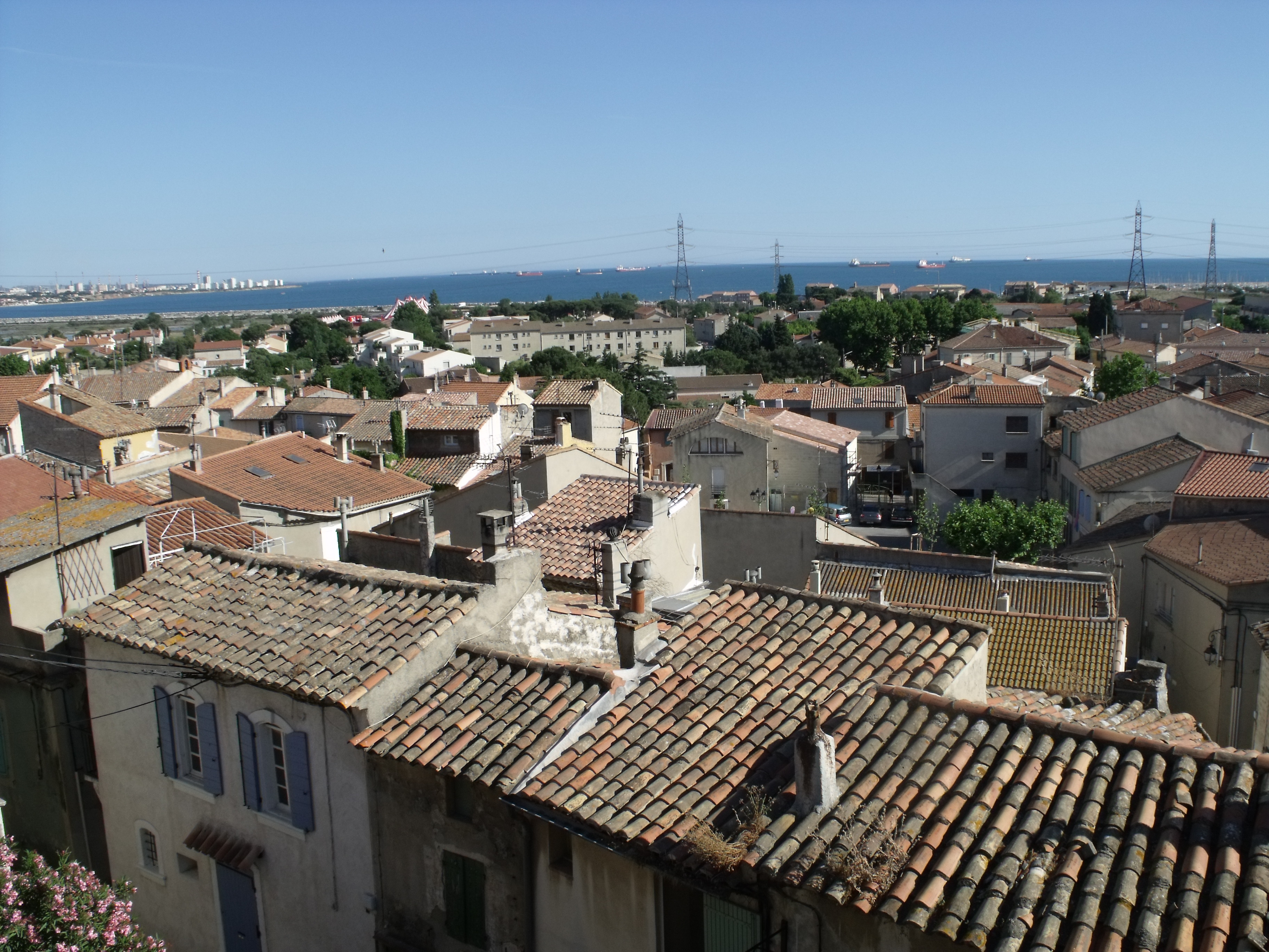 Vue générale de Fos sur Mer